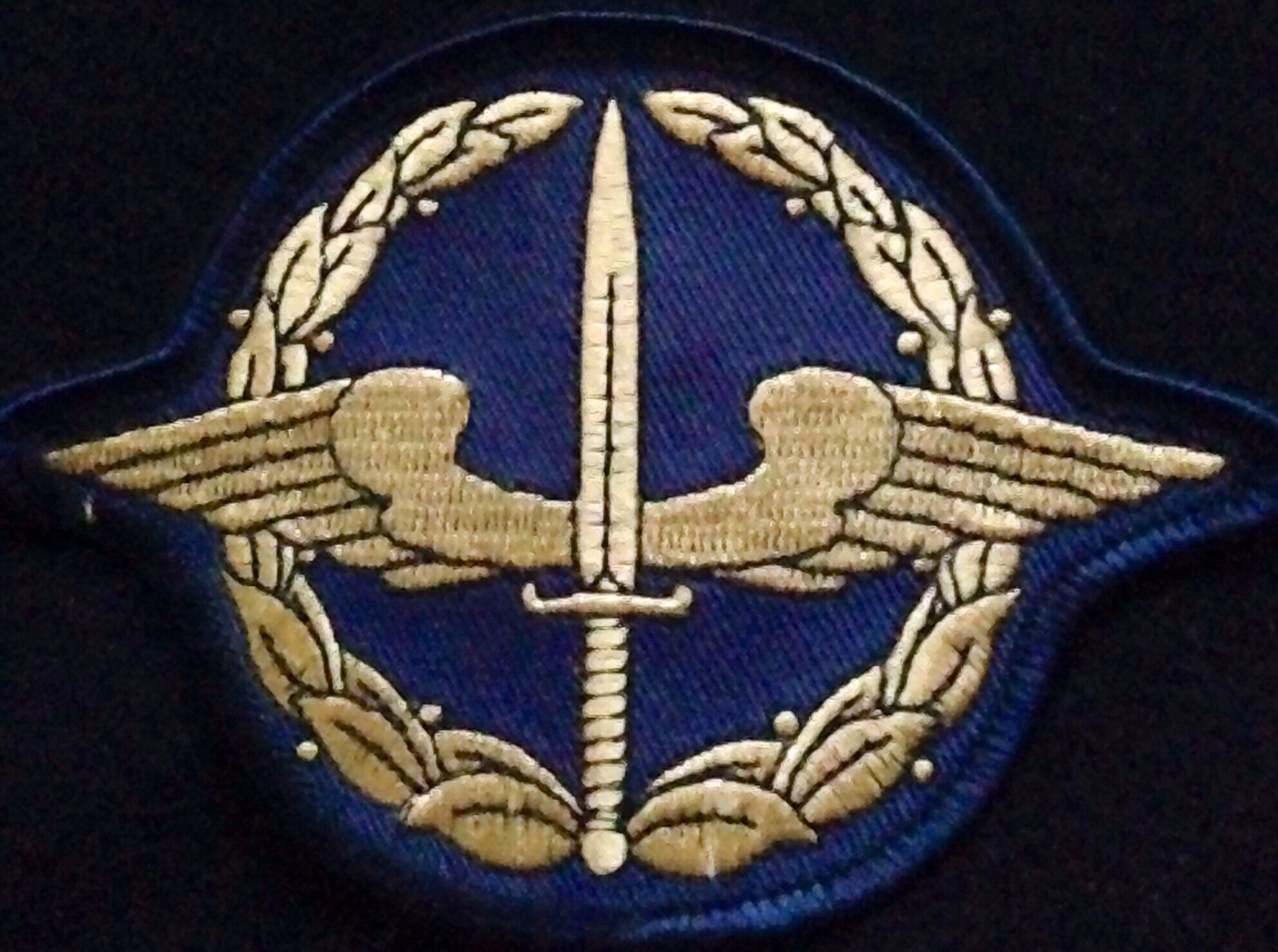 Piketen/FRI utbildningstecken